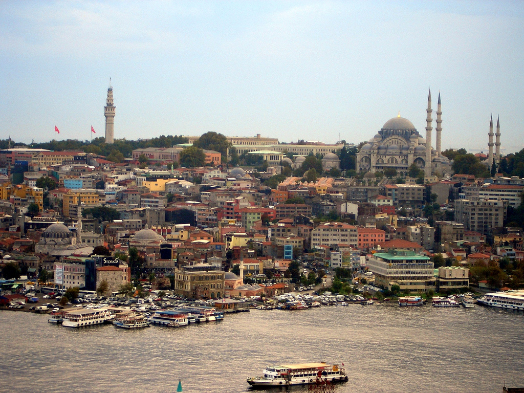 solda Beyazıt Kulesi sağda Süleymaniye Camii